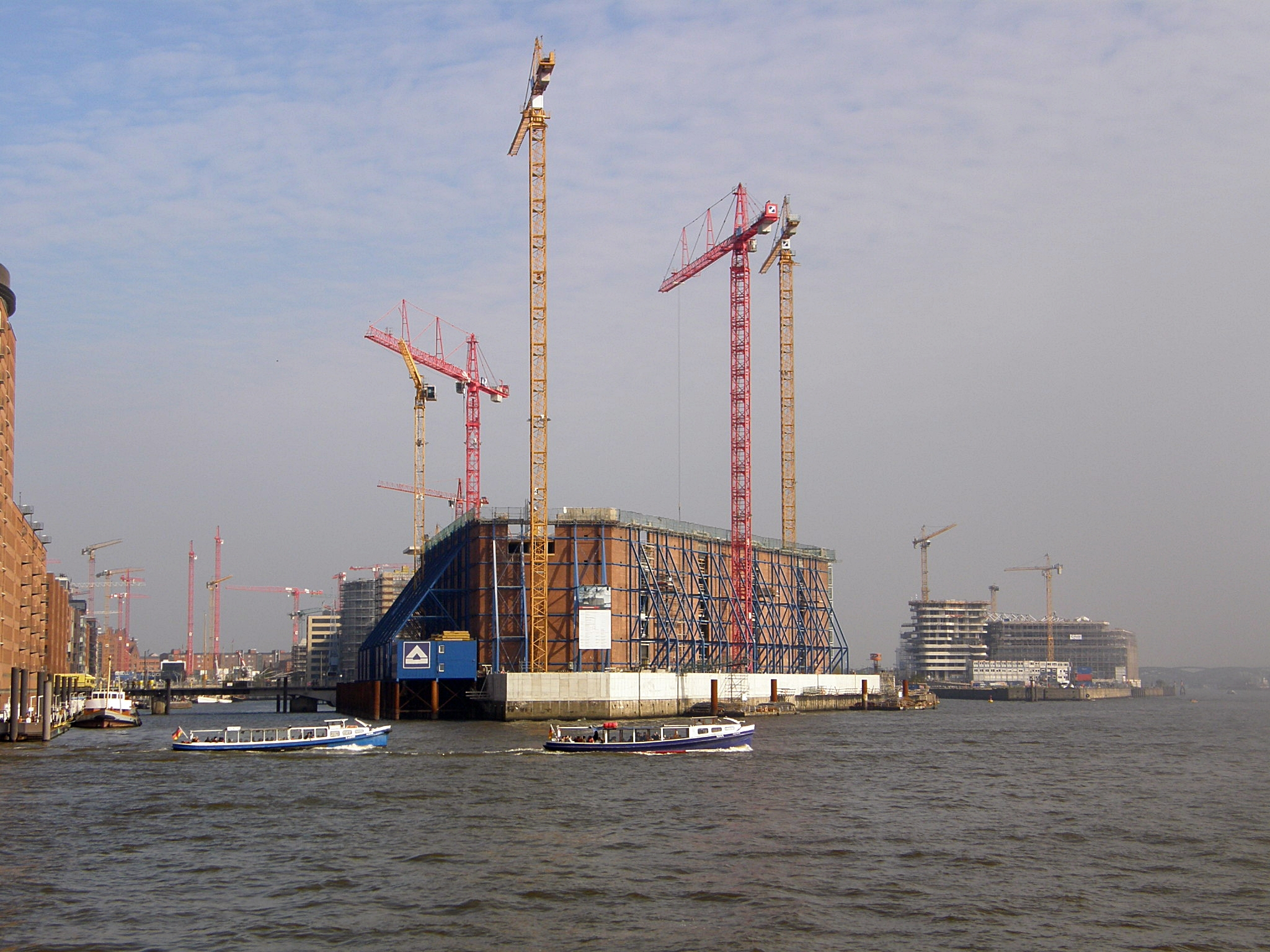 baustelle der elbphilharmonie hamburg vom niederhafen aus gesehen